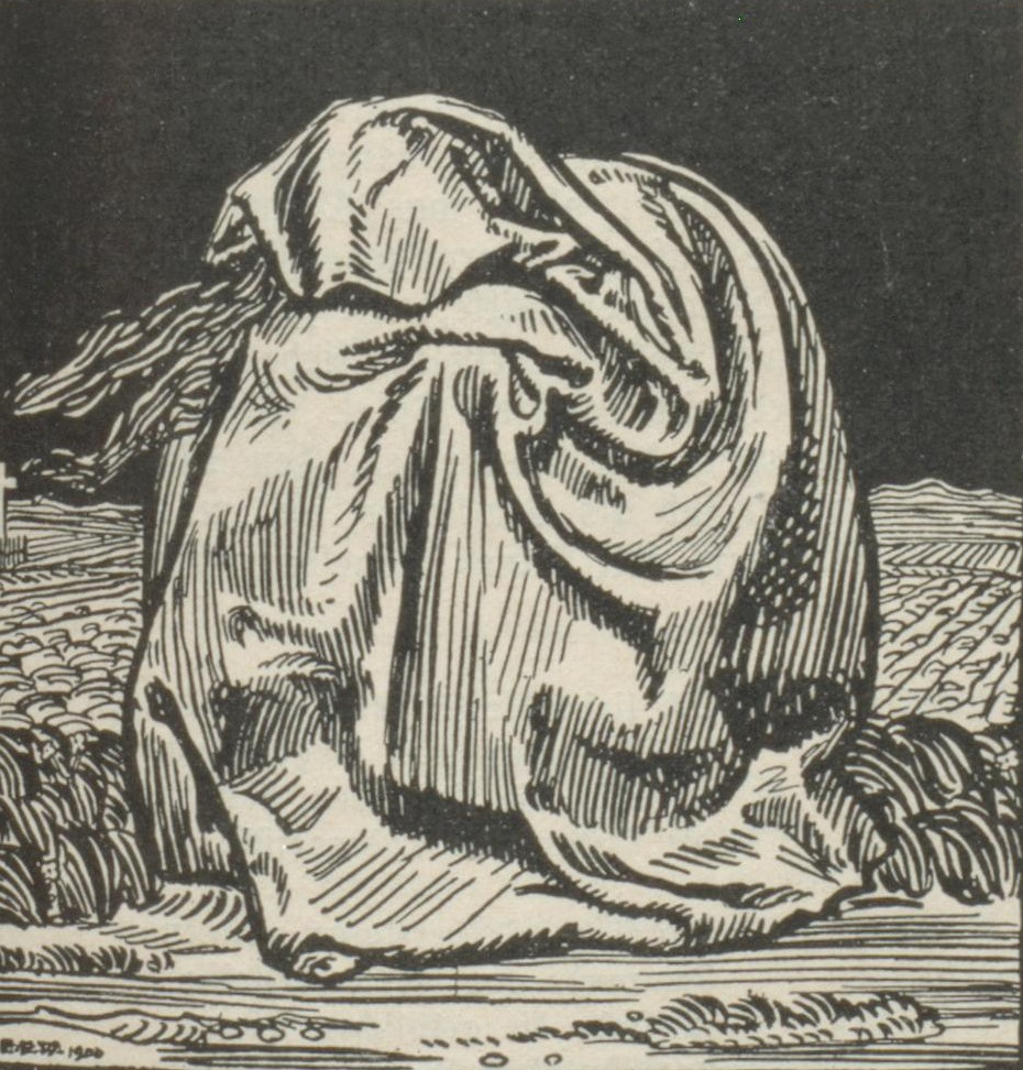 Emil Rudolf Weiß Illustration zur deutschen Ausgabe des Dramas Die Ebene von Émile Verhaeren (Übersetzung aus dem Französischen von Emil Rudolf Weiß), die Jahresangabe ist noch unklar